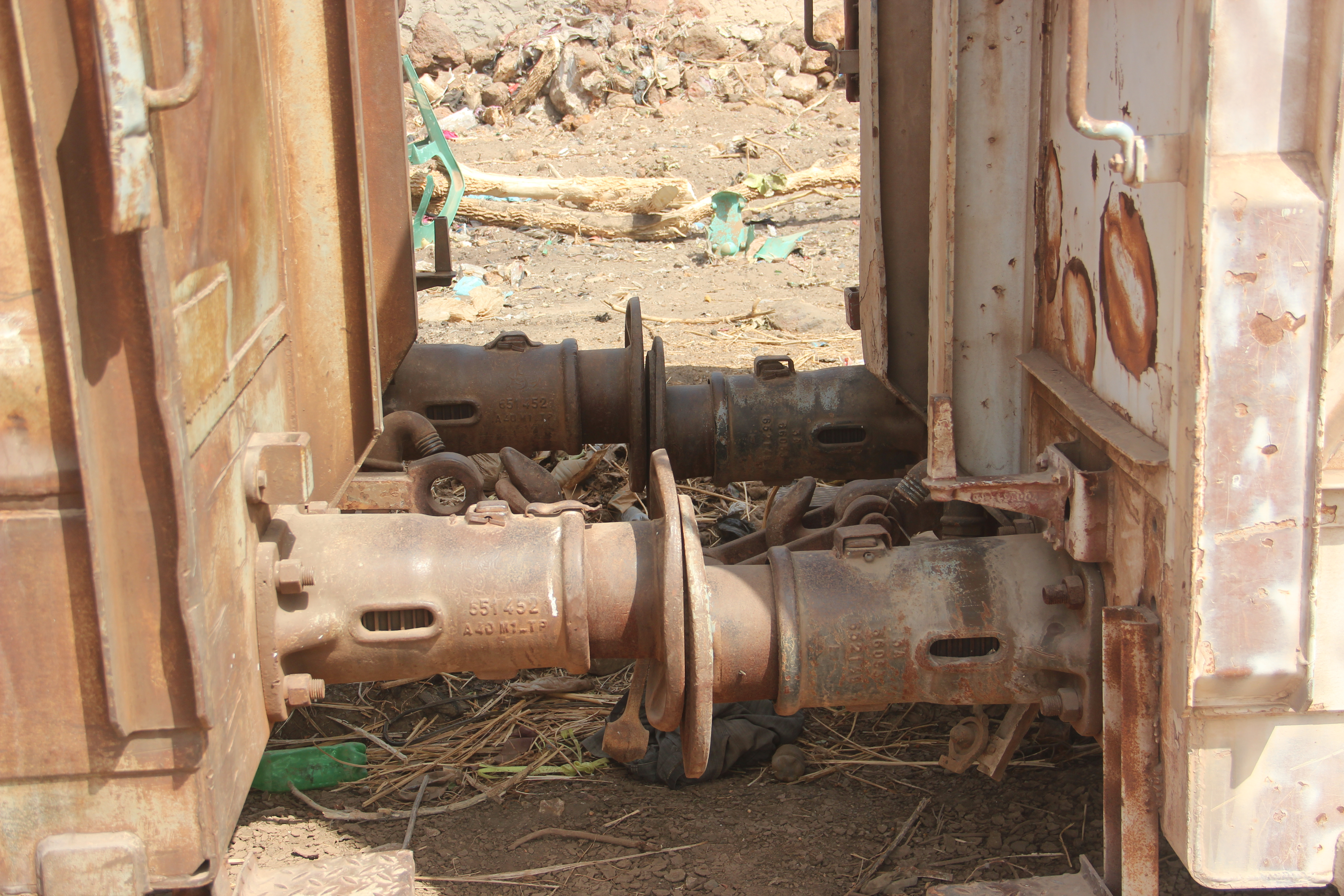 Attelage de trains. This is an image with the theme "Africa on the Move or Transport" from: Senegal